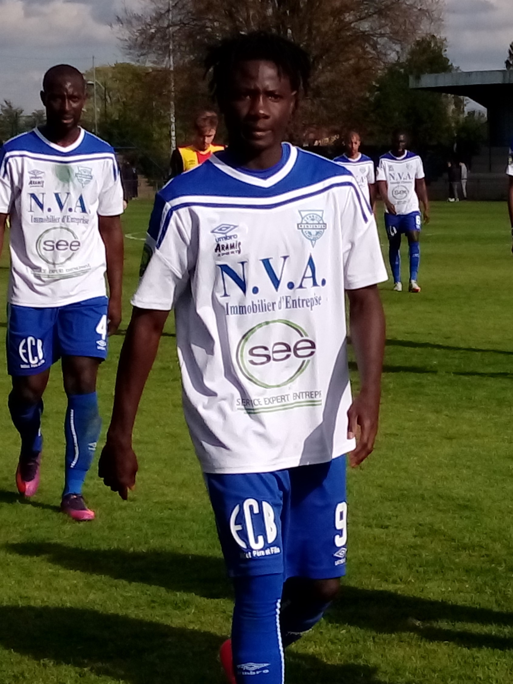 Louckmane Ouedraogo lors du match Lens B / Entente SSG, comptant pour la vingt-septième journée du Championnat de CFA 2016-2017, le 22 avril 2017.